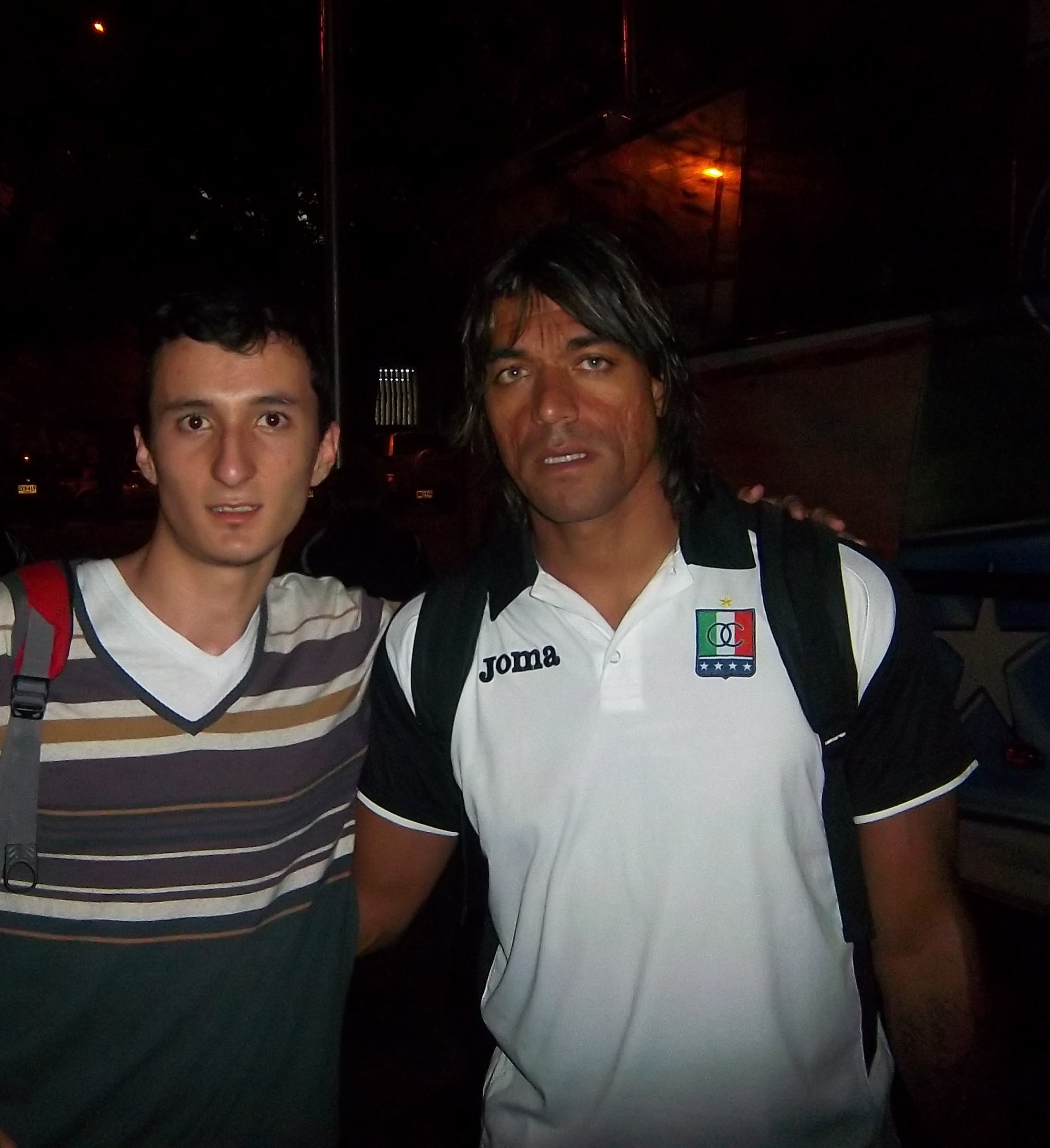 Juan Carlos Henao y un hincha del Once Caldas.